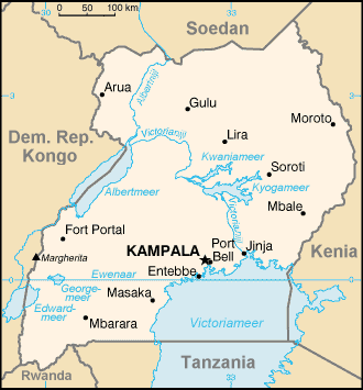 Nederlandse vertaling CIA-kaart door Danielm.